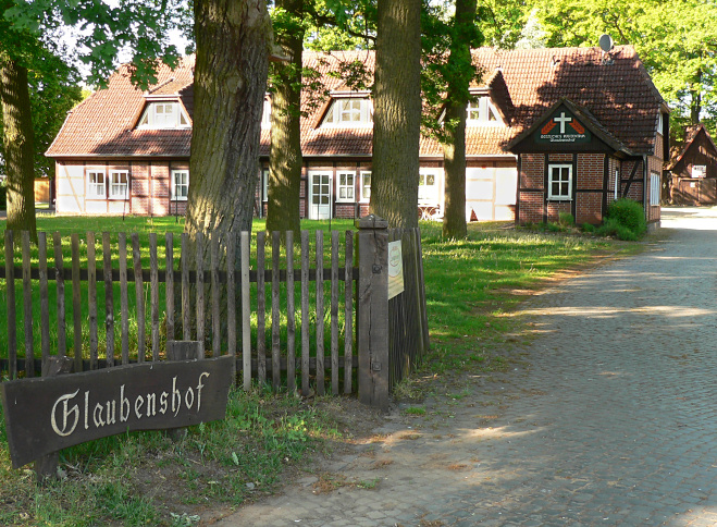 Glaubenshof Geistliches Rüstzentrum Krelingen